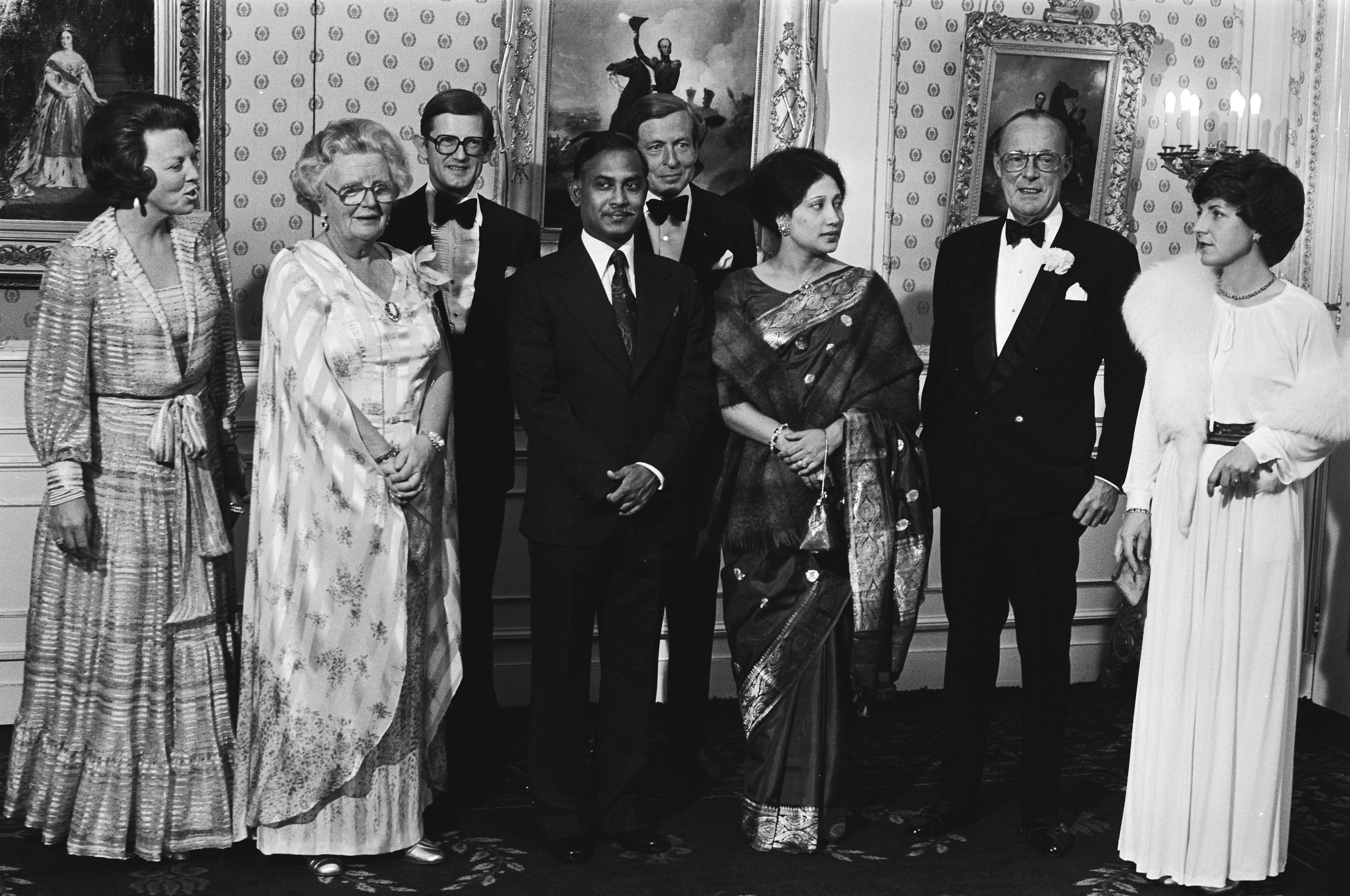 Statiefoto op paleis Soestdijk. V.l.n.r. Beatrix, H.M., van Vollenhoven, Ziaur Rahman, Claus, Mw. Begem Ziaur Rahman, Bernhard en Margriet